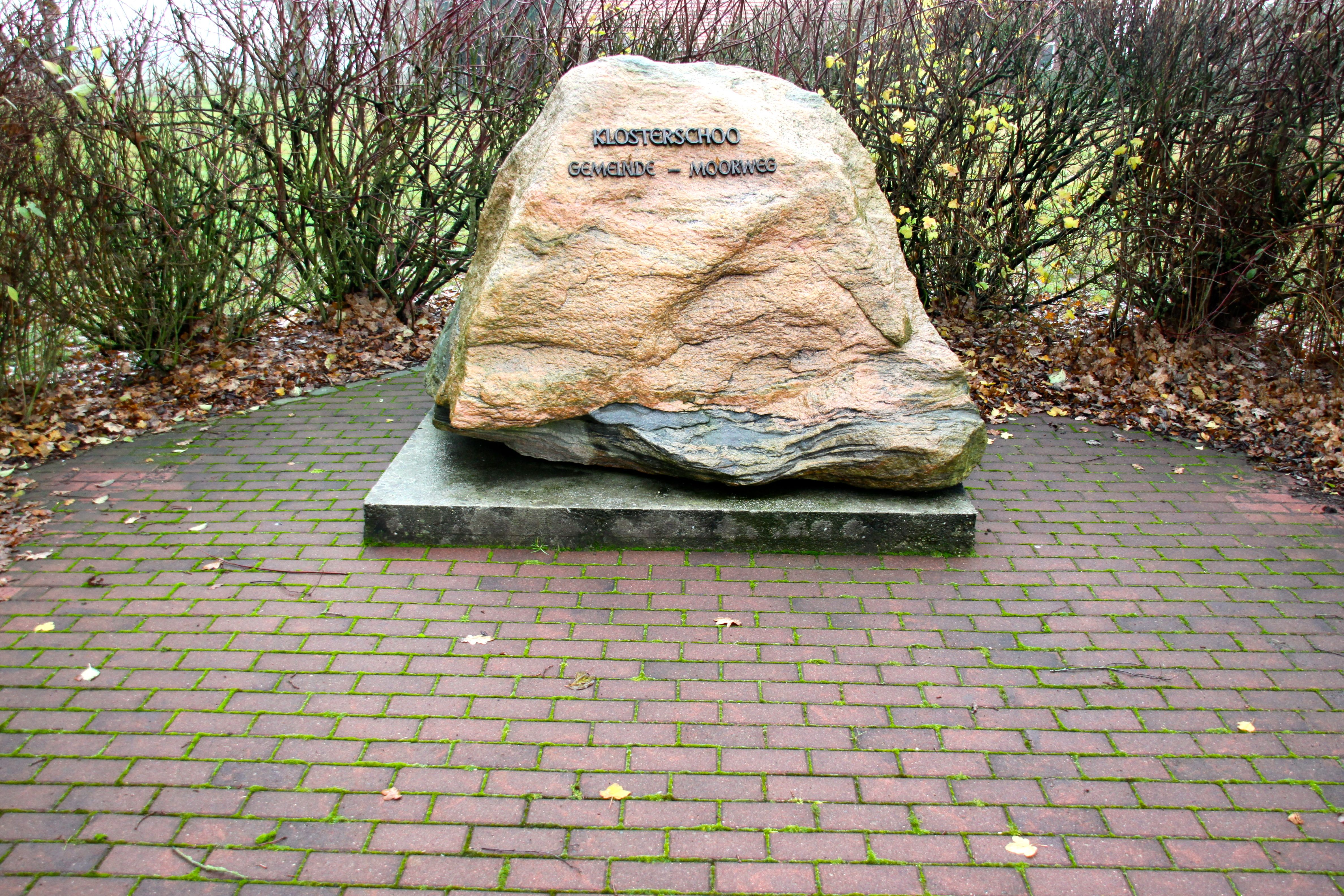 Gedenkstein in Kloster Schoo